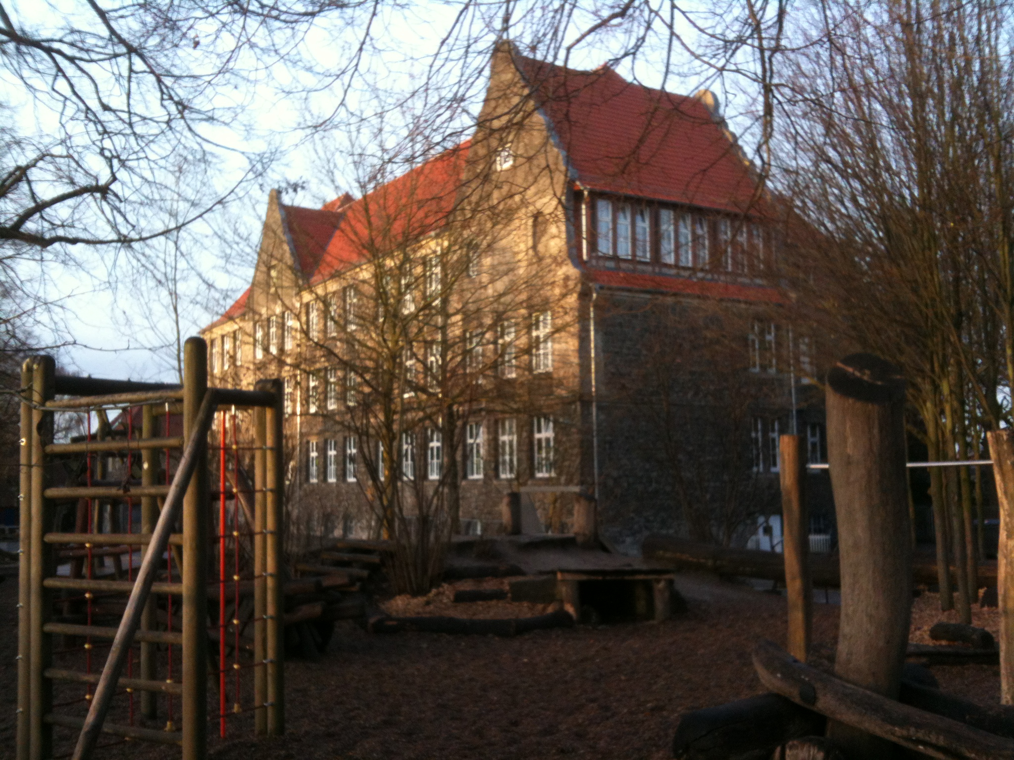 Hauptgebäude der Weerthschule in Detmold, NRW, Germany, Erbaut 1911